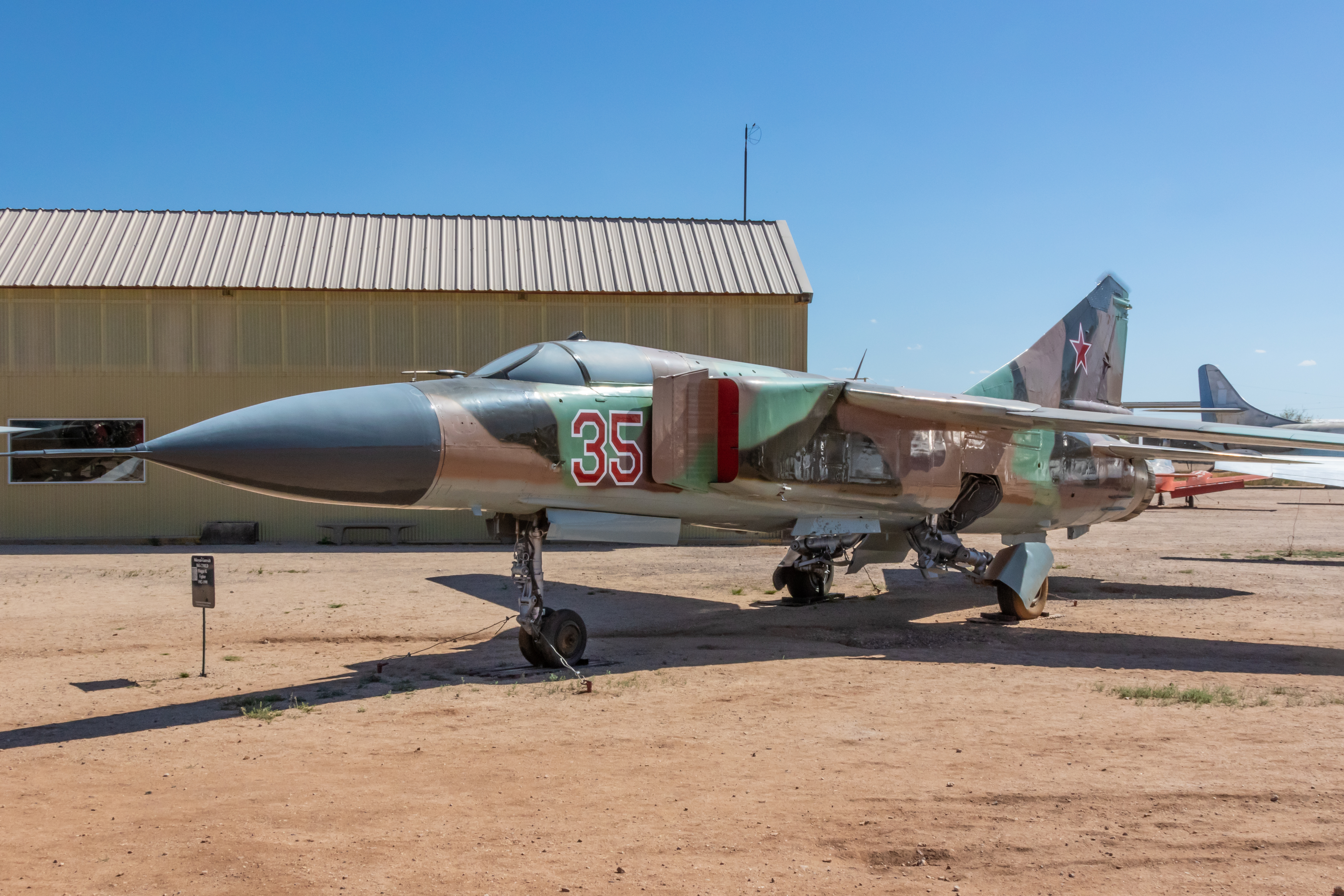 Mikoyan Gurevich MiG-23MLD Flogger K